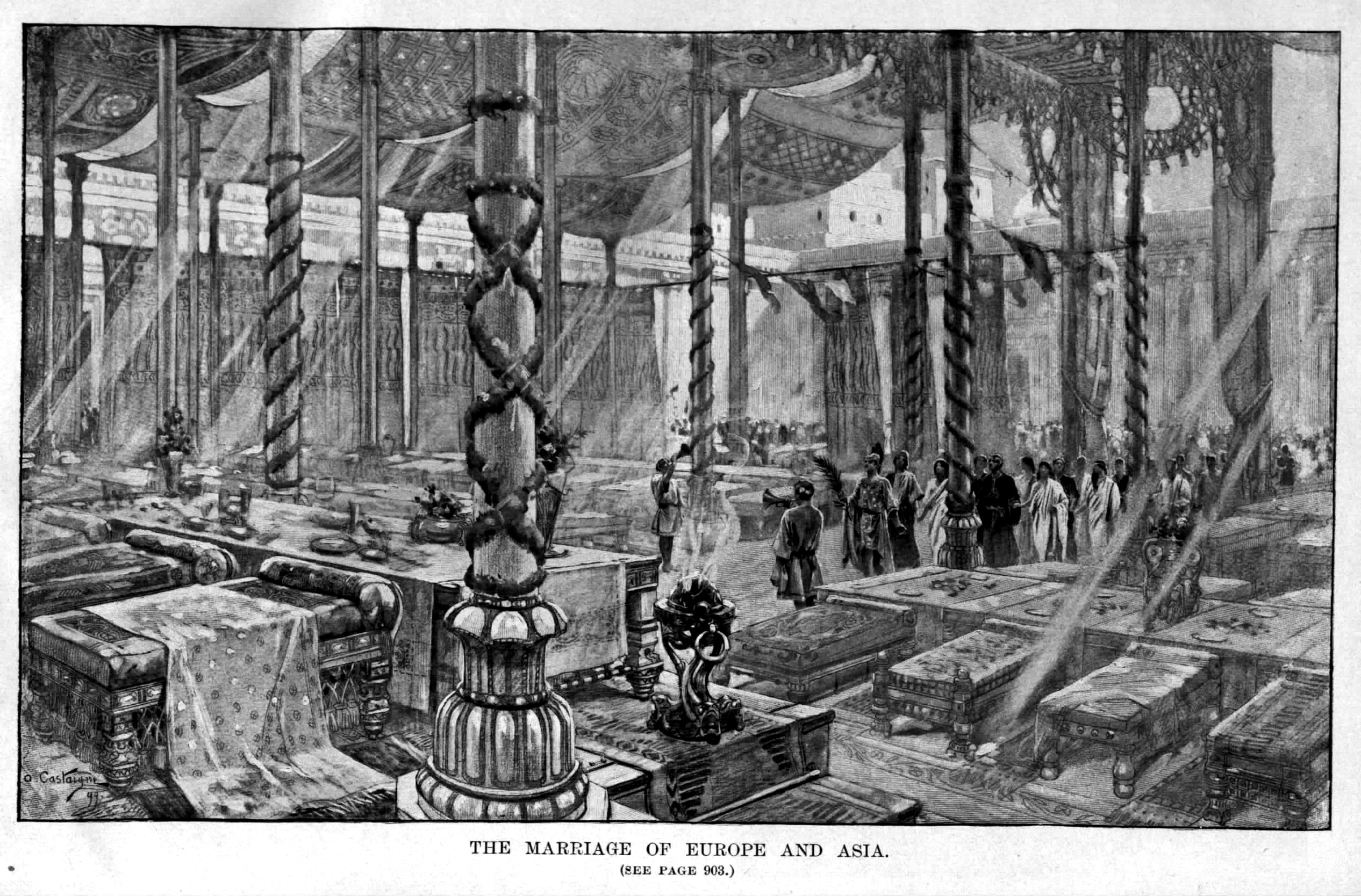 Alexander old drawings